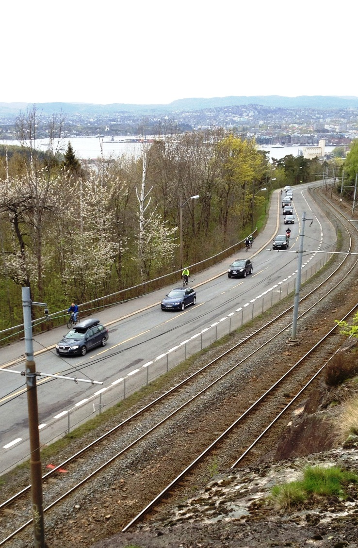 Kongsveien, Oslo